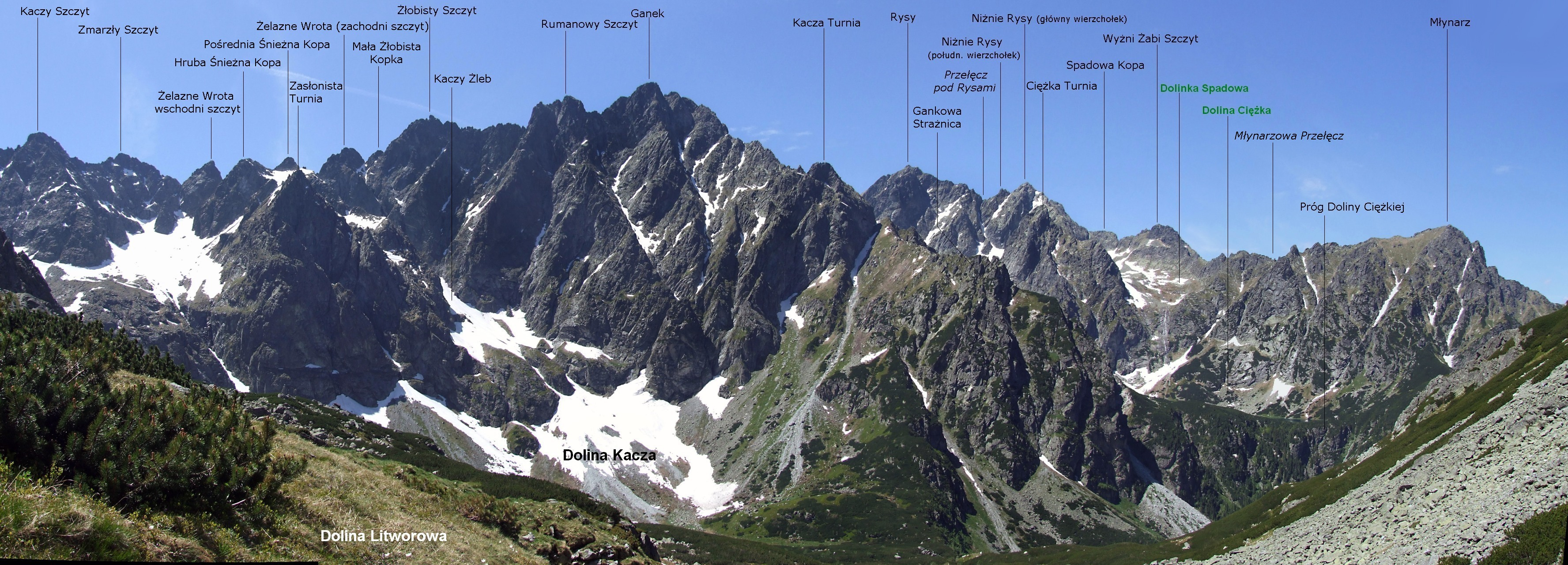 Panorama z Doliny Litworowej (Tatry Wysokie)w kierunku południowym, zachodnim i północnym